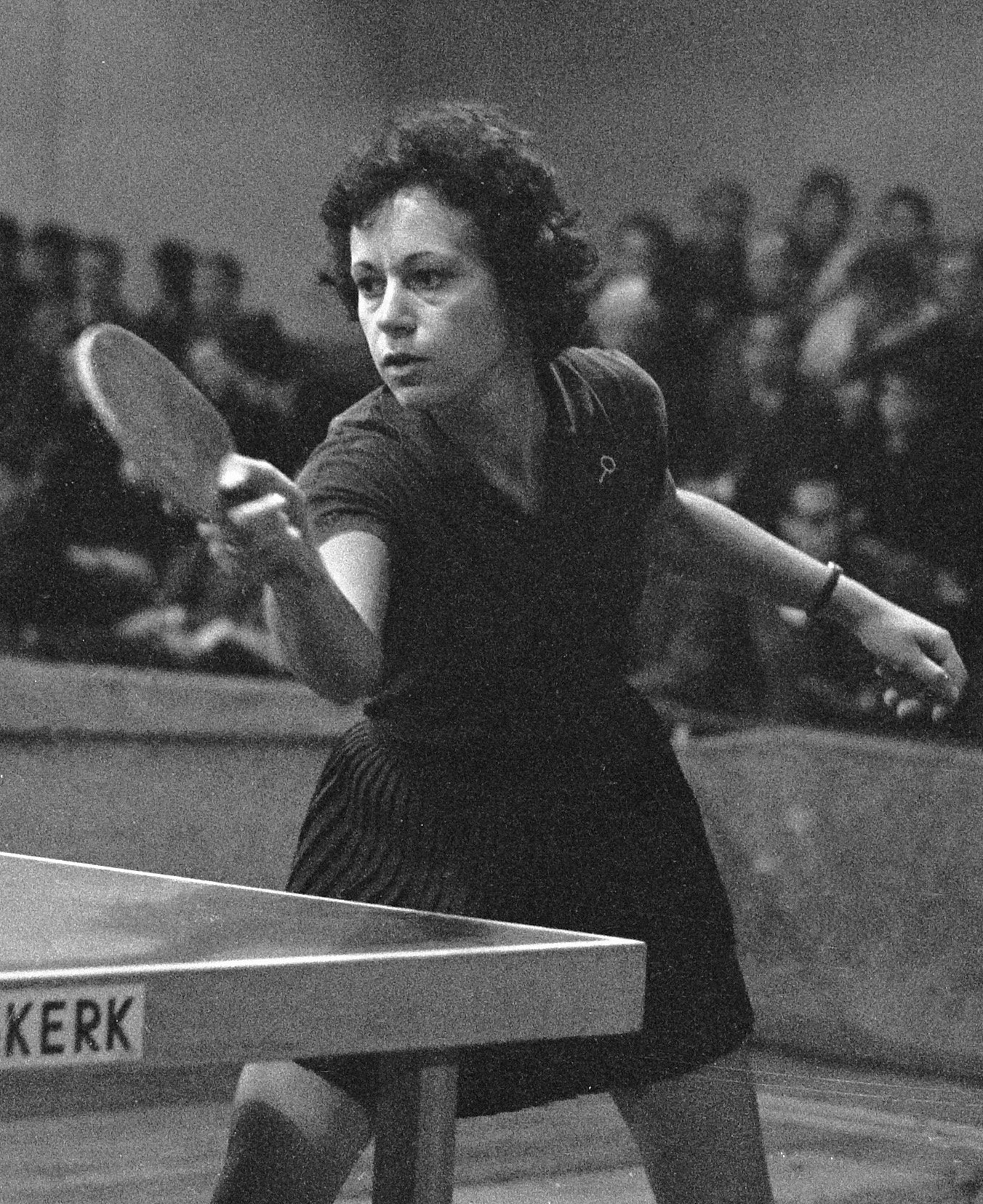 Tafeltennis Tiende Internationale Kampioenschappen. Agnes Simon.